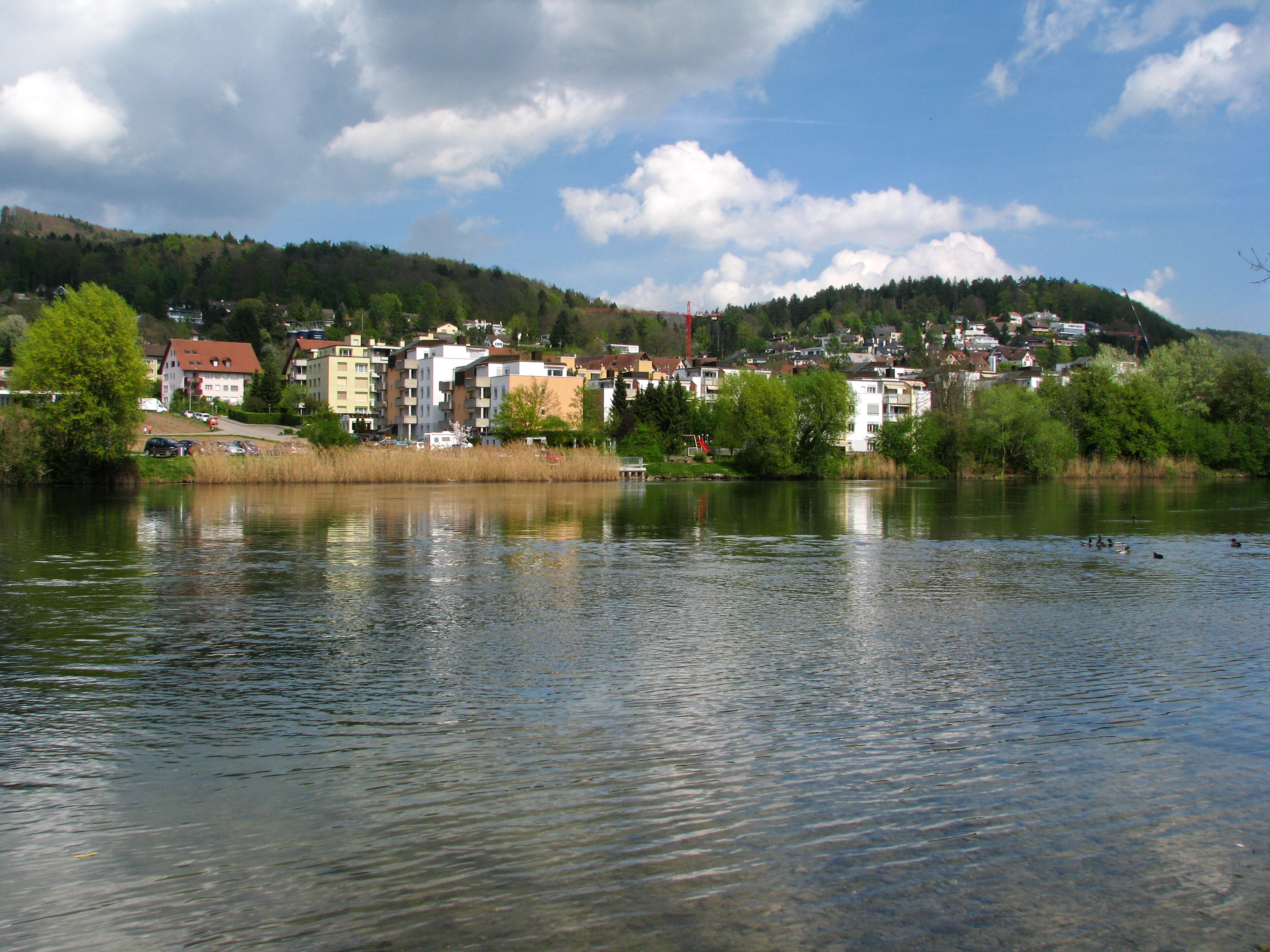 Limmat in Oetwil an der Limmat